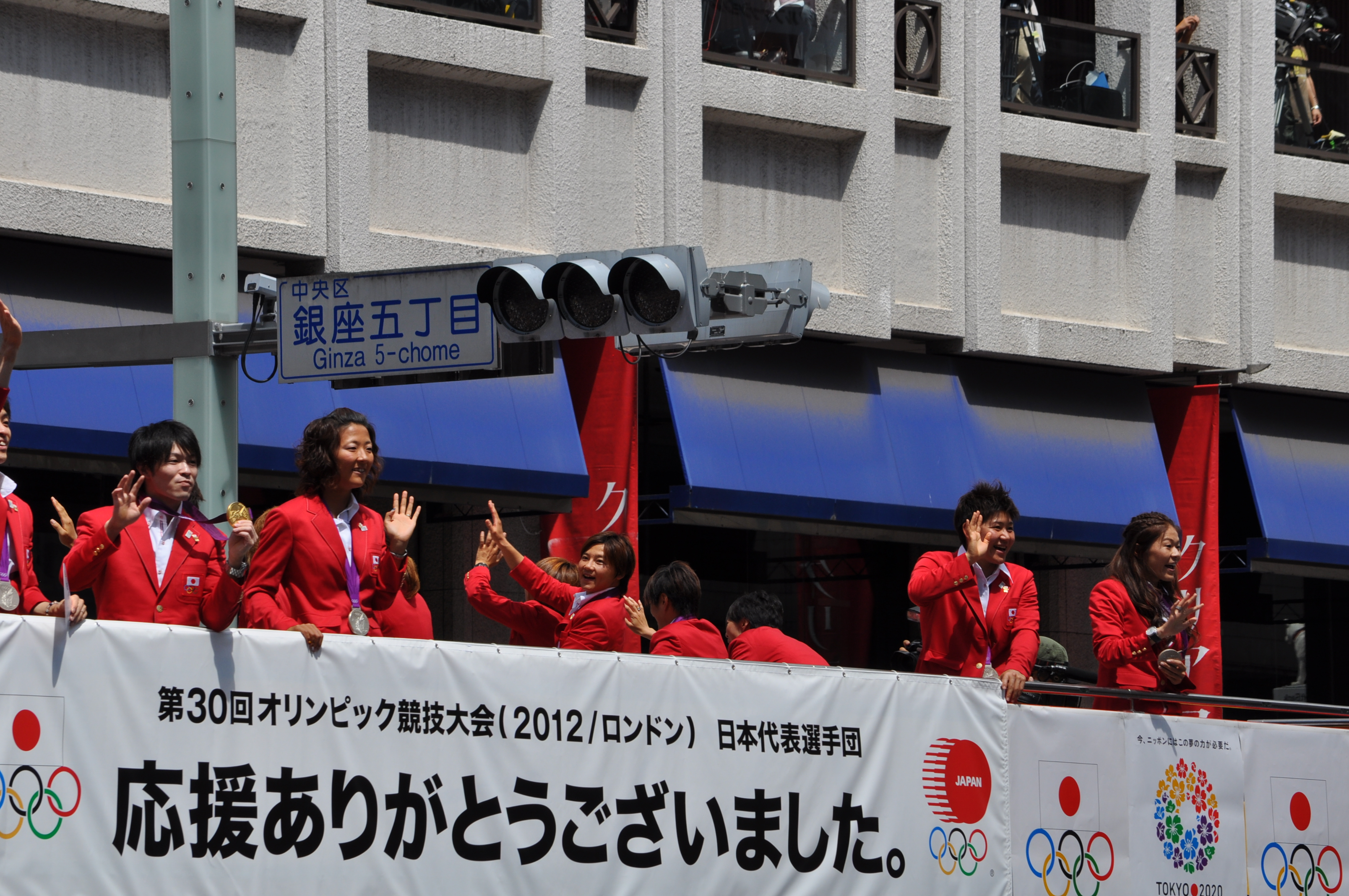 オリンピック凱旋パレード